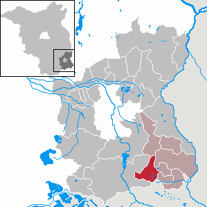 Felixsee in Brandenburg (Country) - District Spree-Neiße